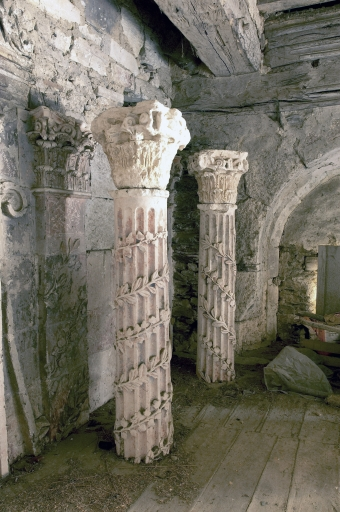 Chapelle vue de l’intérieur. Retable Colonne